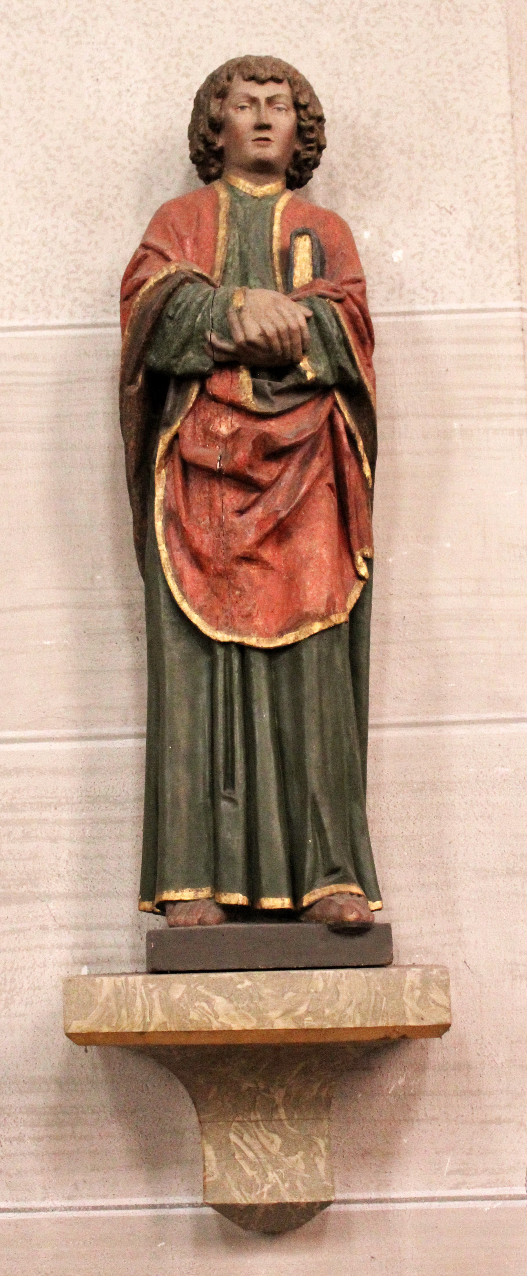 Hl. Johannes (Evangelist) (Nicht wir irrtümlich im Titel vermerkt der Hl. Kosmas)